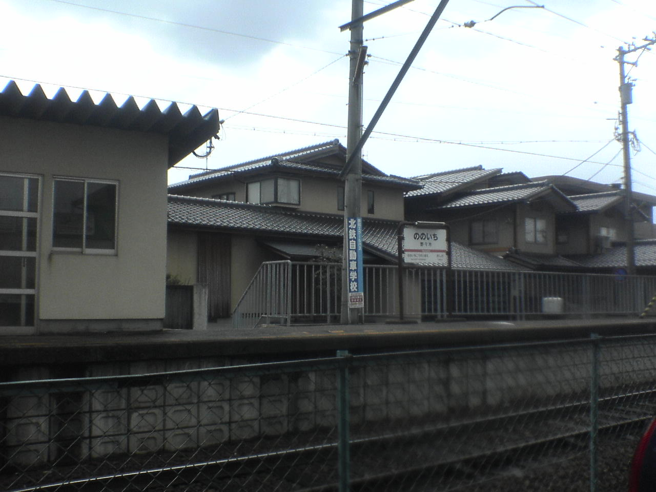 北陸鉄道石川線・野々市駅を2006年3月30日投稿者自身が撮影。